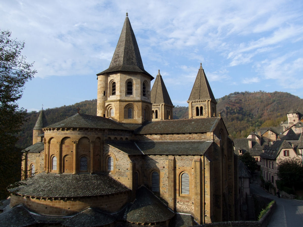 Abbatiale Sainte-Foy de Conques, Conques, France